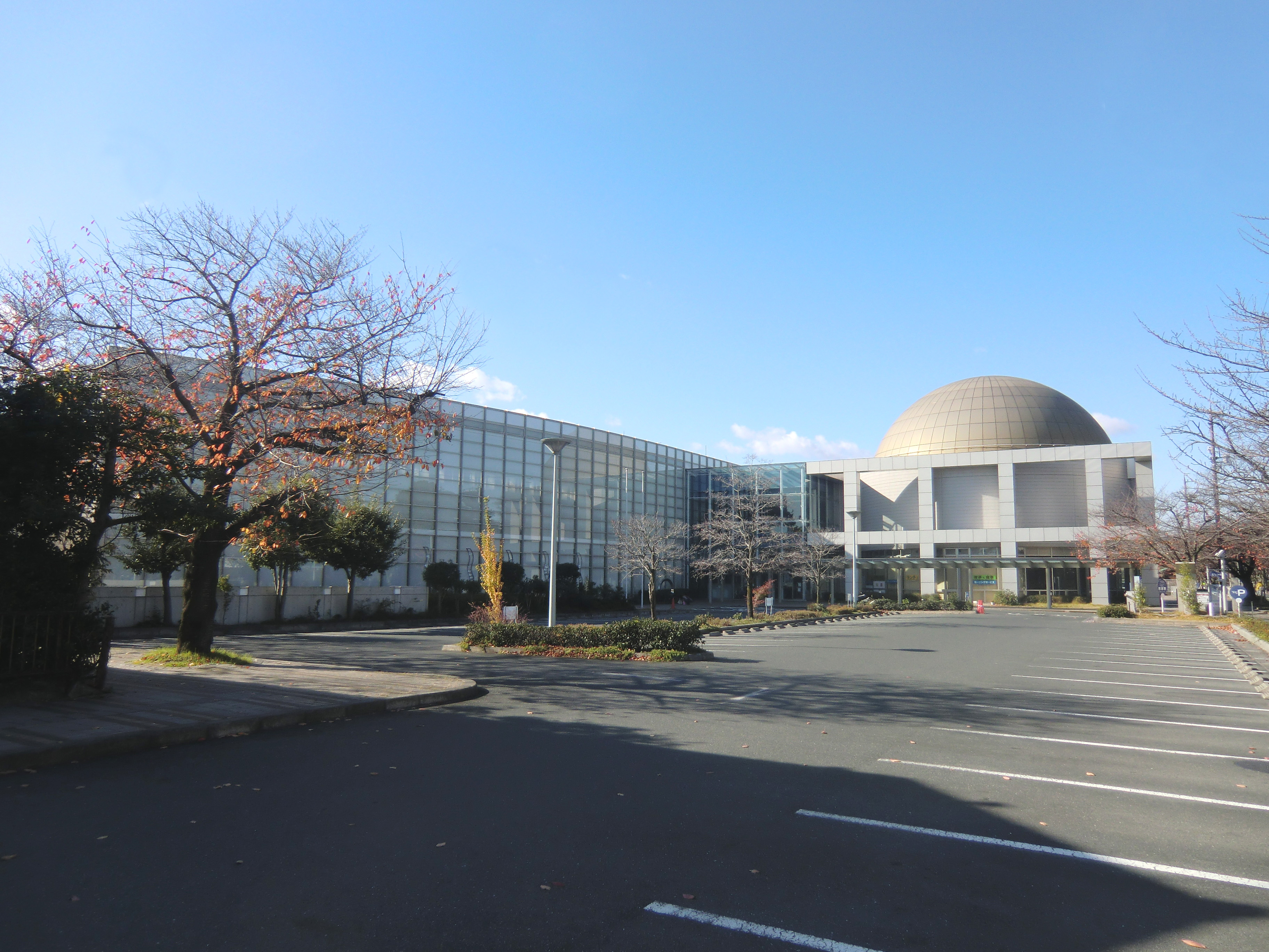 豊川市中央図書館。愛知県豊川市諏訪 Unknown